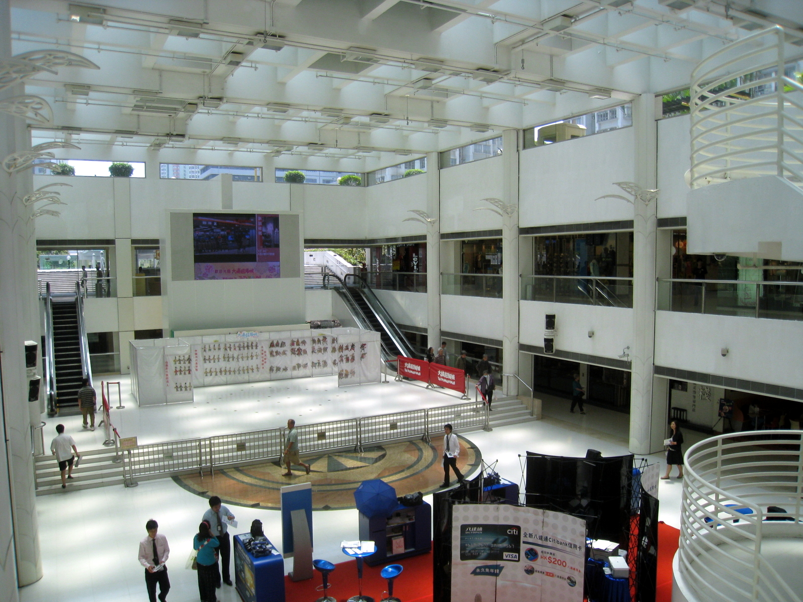 Tai Po Mega Mall Zone C Void 大埔超級城 C 區